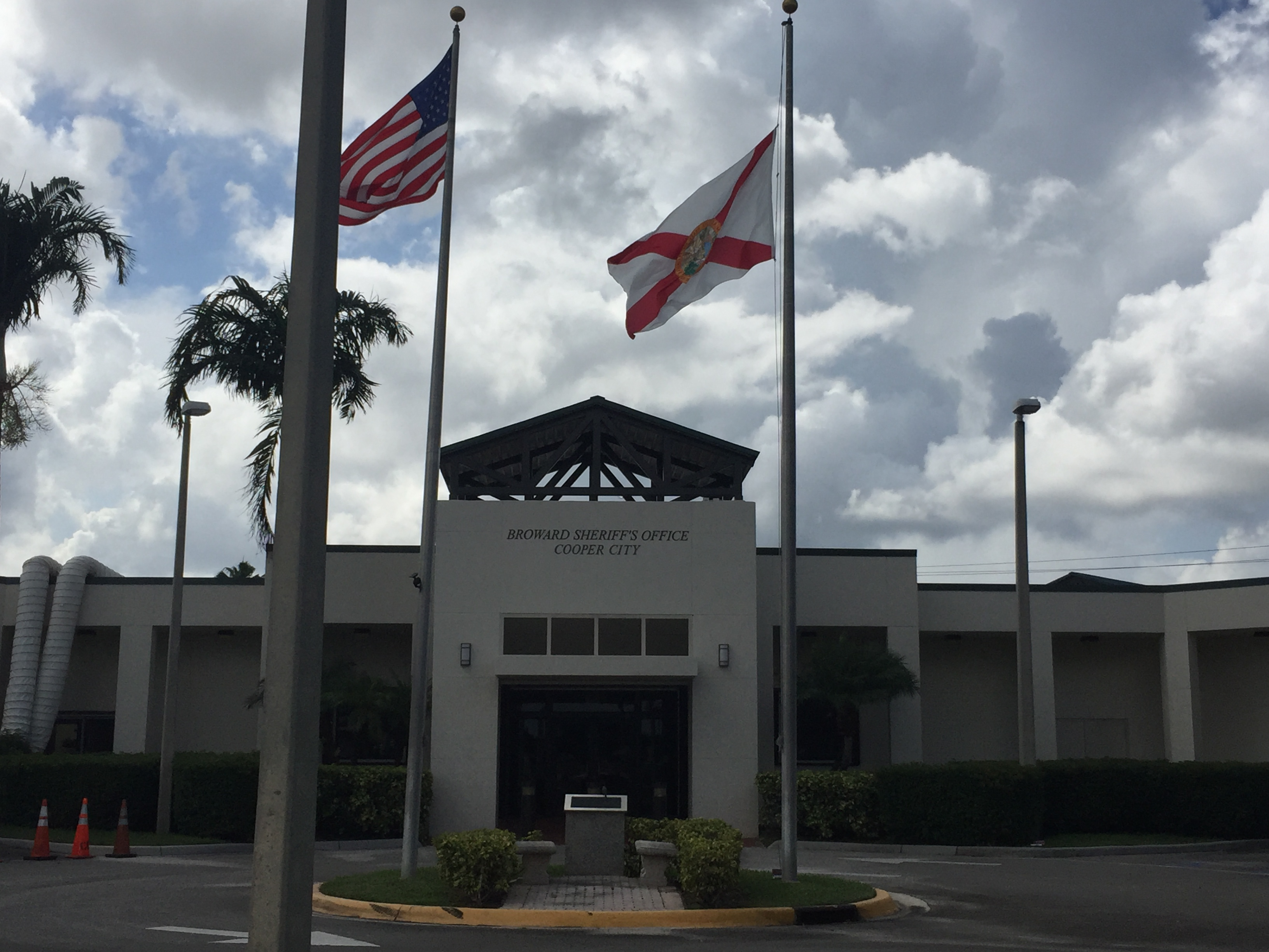 Sheriff's Office Cooper City, Florida